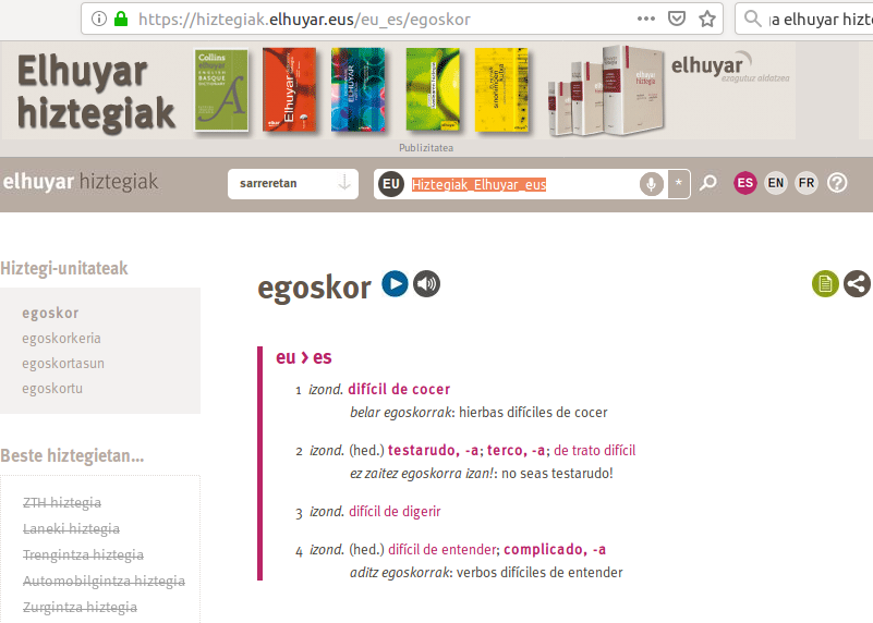 Elhuyar hiztegien webgunea